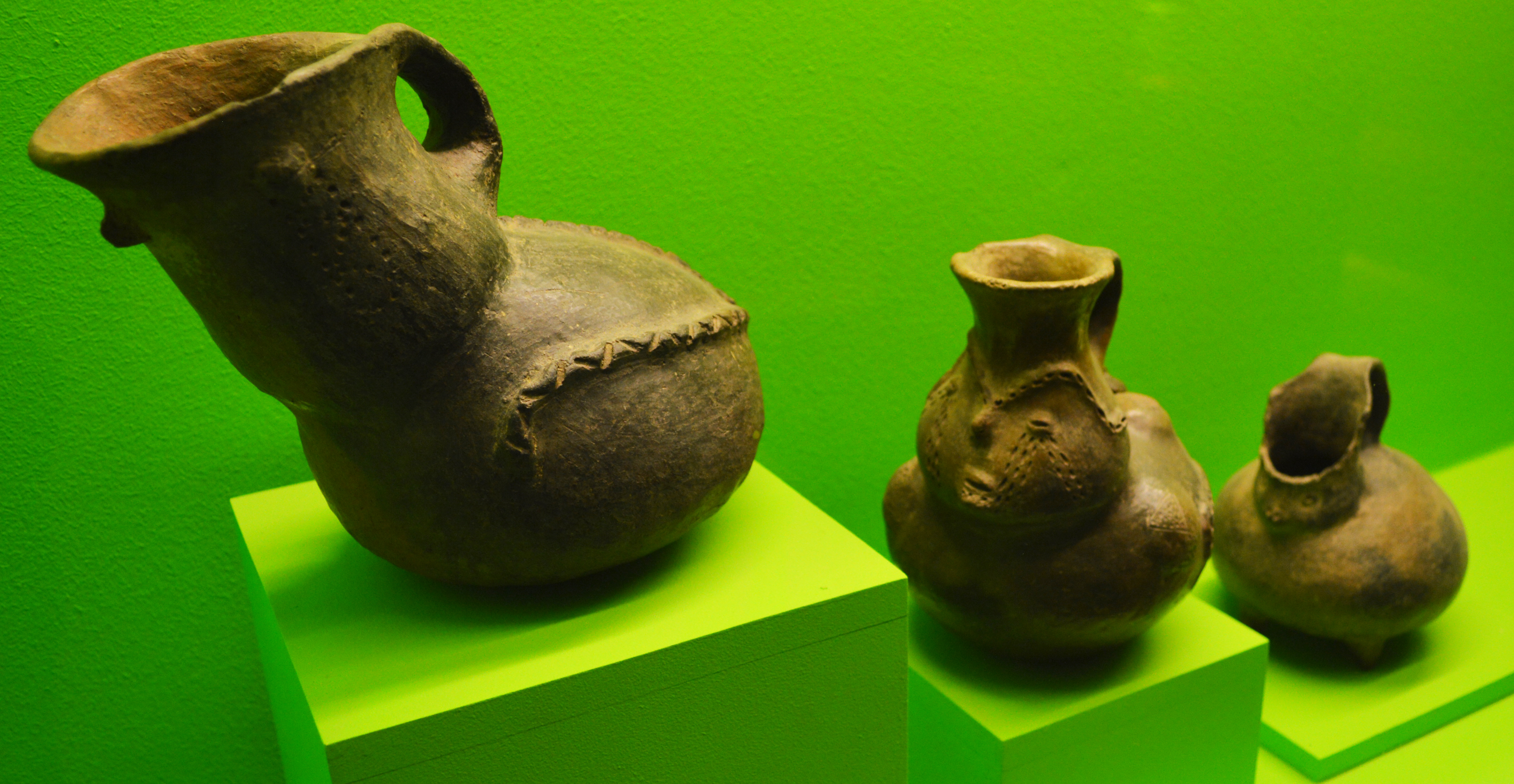 Alfarería indígena.